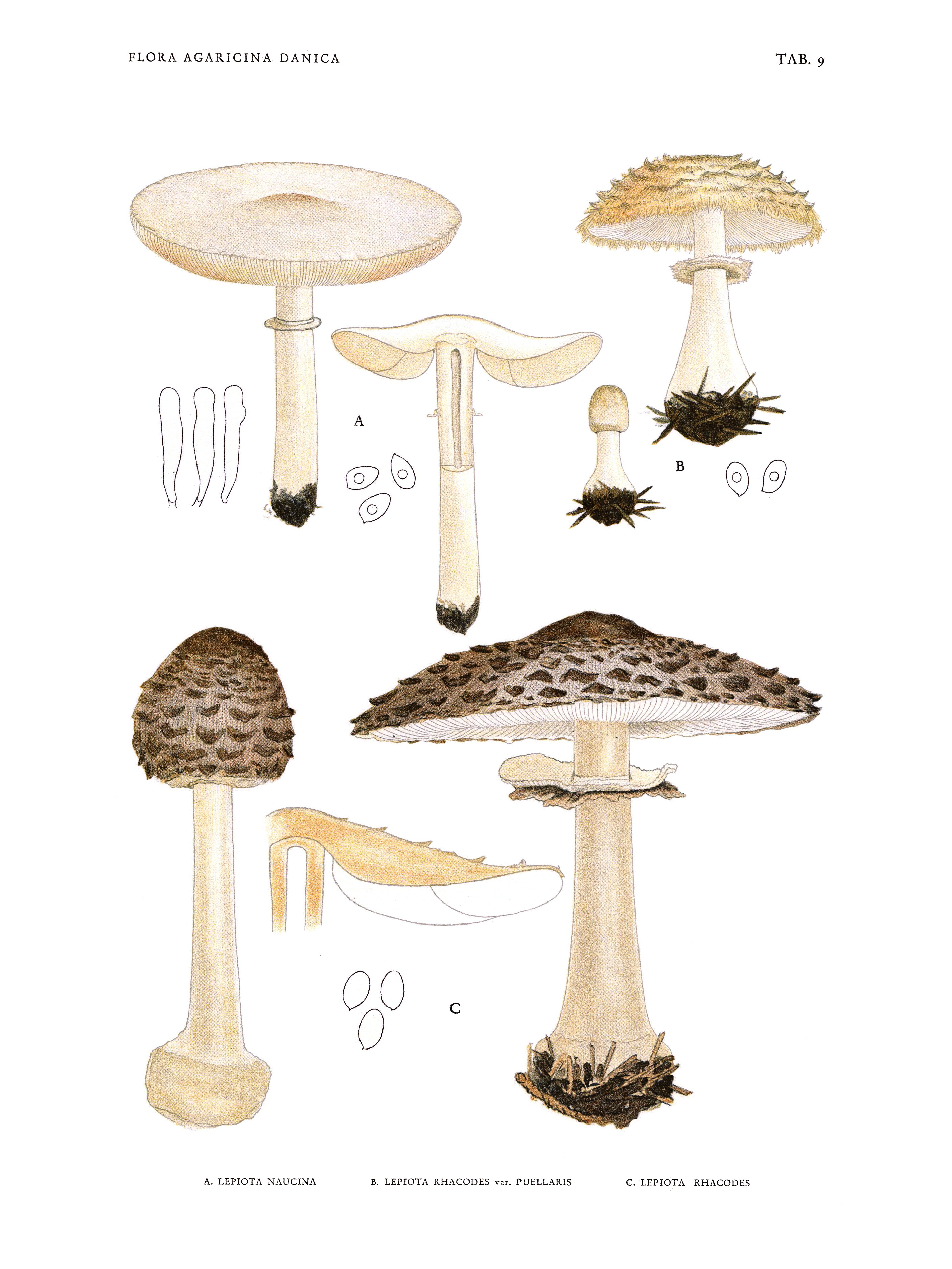 Jakob E. Lange: Flora agaricina Danica. Vol. 1; TAB. 9 A. Leucoagaricus leucothites as Lepiota naucina B. Leucoagaricus nympharum as Lepiota rhacodes var. puellaris C. Chlorophyllum rachodes as Lepiota rhacodes